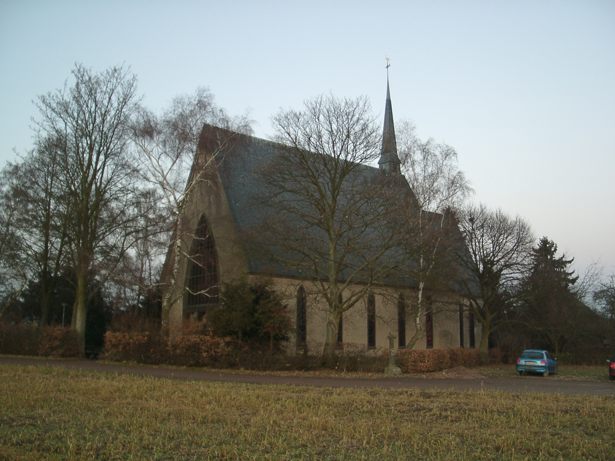 Schwanenkirche bei Roes (Eifel)